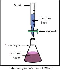 titrasi